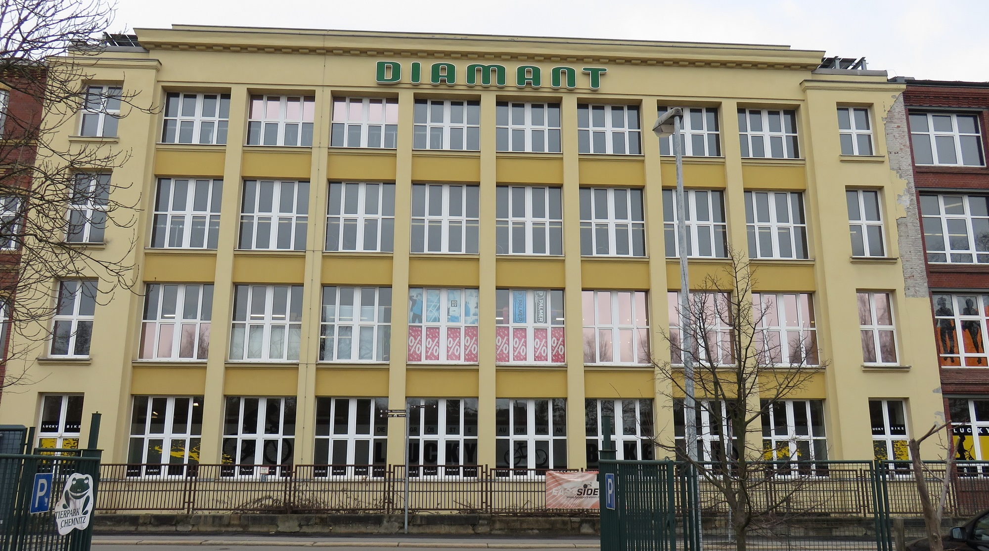 Büro und Geschäftsgebäude. Kulturdenkmal Chemnitz Reichenbrand.